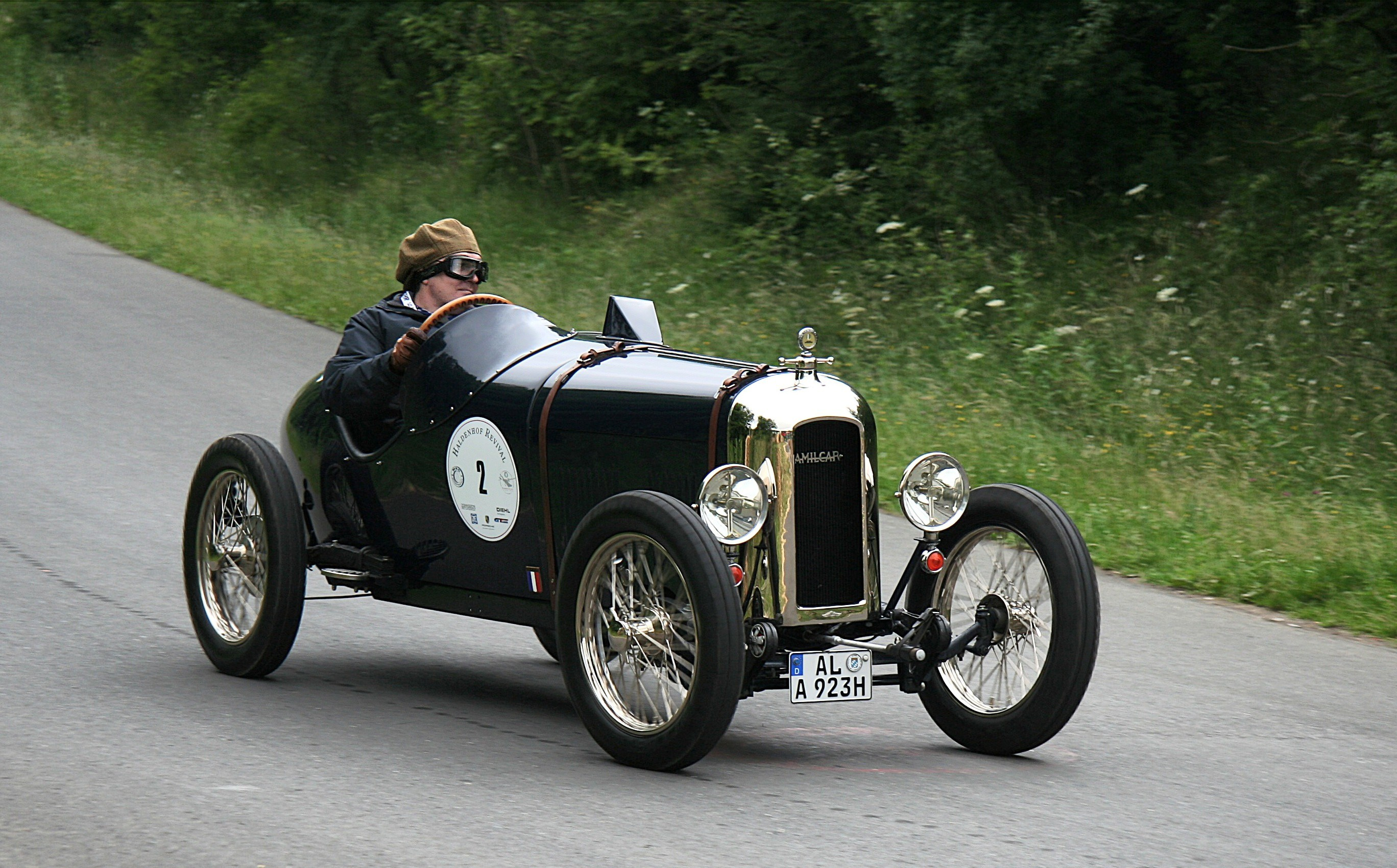 Amilcar CS mit Duval-Karosserie, 4-Zyl.-Motor, 985 cm³, 23 PS, beim Oldtimer-Festival des DAMC 05 auf dem noch erhaltenen Teil der Südschleife des Nürburgrings